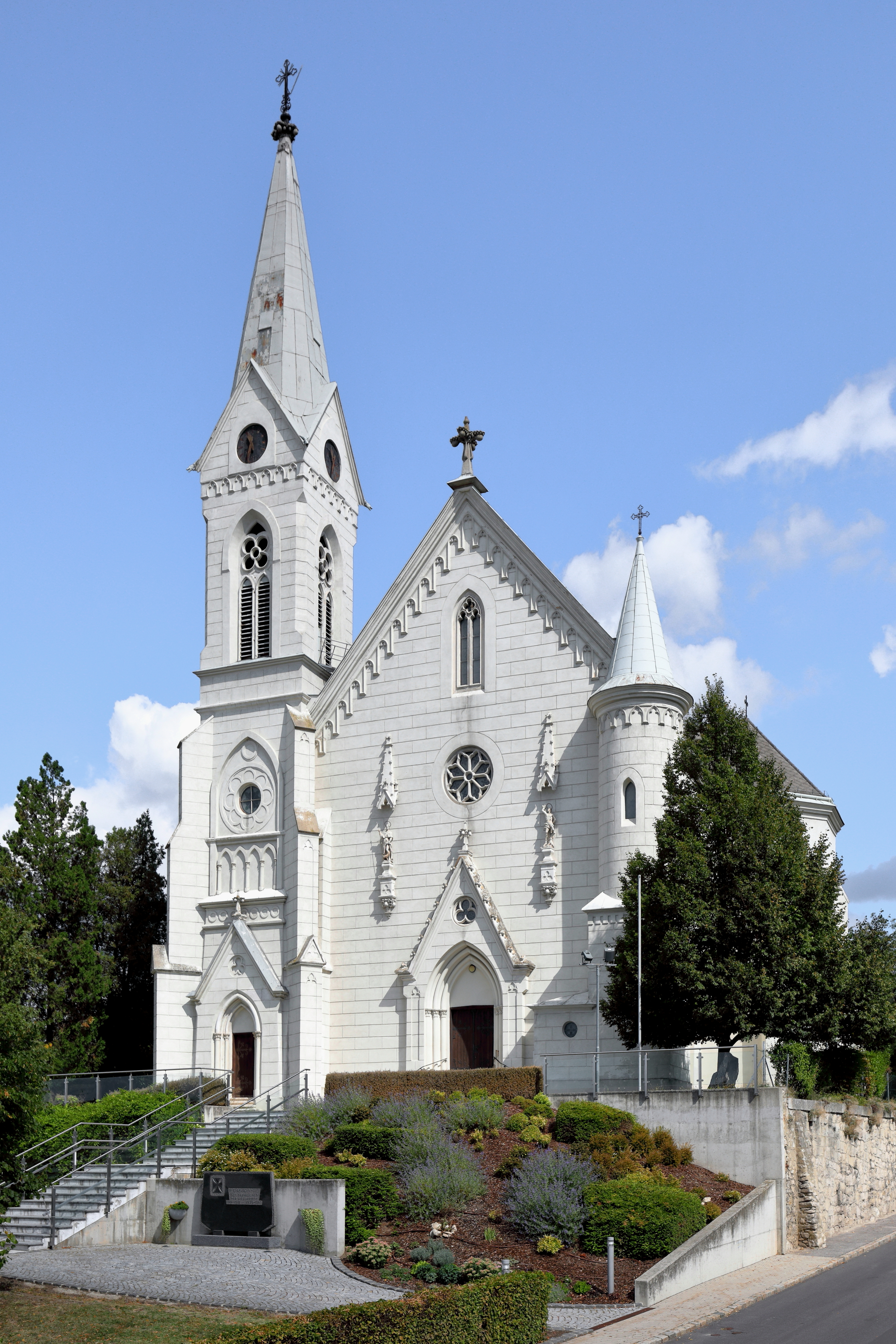 Die röm.-kath. Pfarrkirche hl. Ägidius in der burgenländischen Gemeinde Müllendorf. Die Kirche wurde anstelle einer gotischen Vorgängerkirche von 1904 bis 1905 nach den Plänen des Architekten Johann Schiller errichtet.